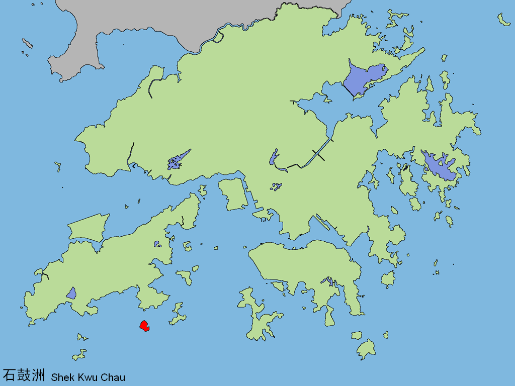 中文（香港）: 石鼓洲。